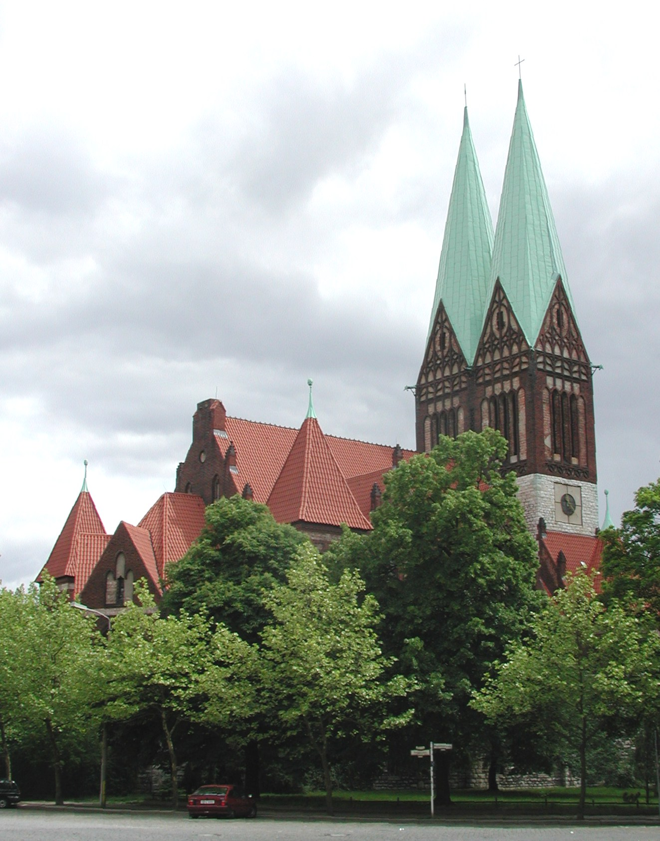 Gesamtansicht der ehemalige Glaubenskirche